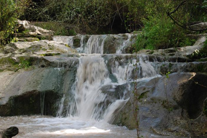 כשבנחל היו מים